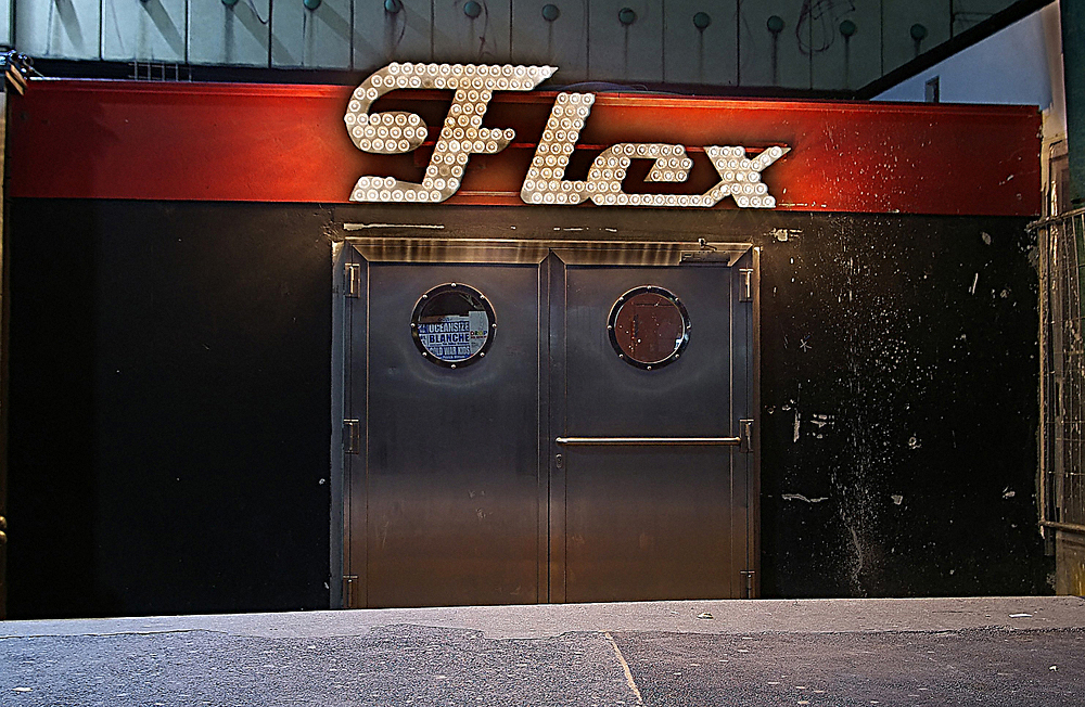 Flex-Club, Vienna